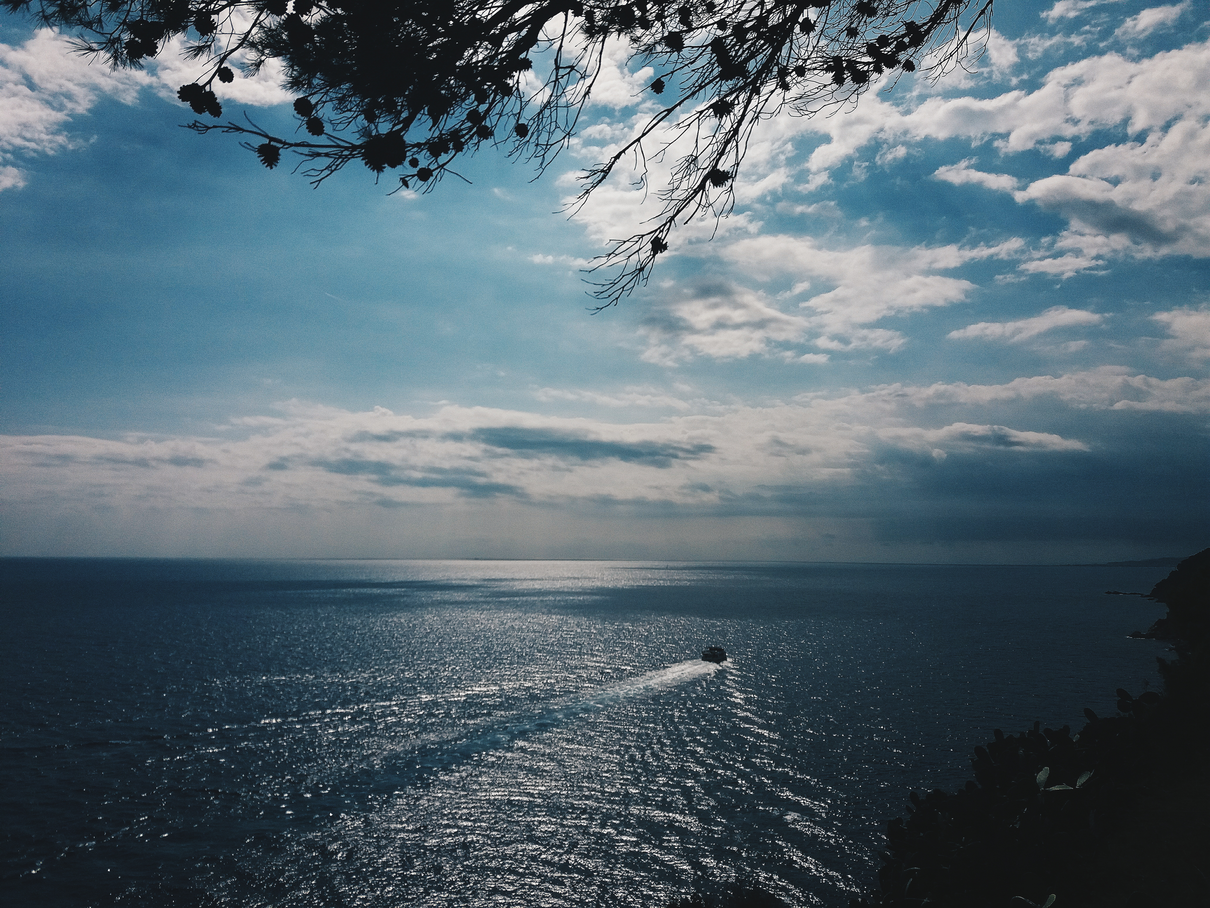 Шпанија, Тоса де Мар, на земљи рај